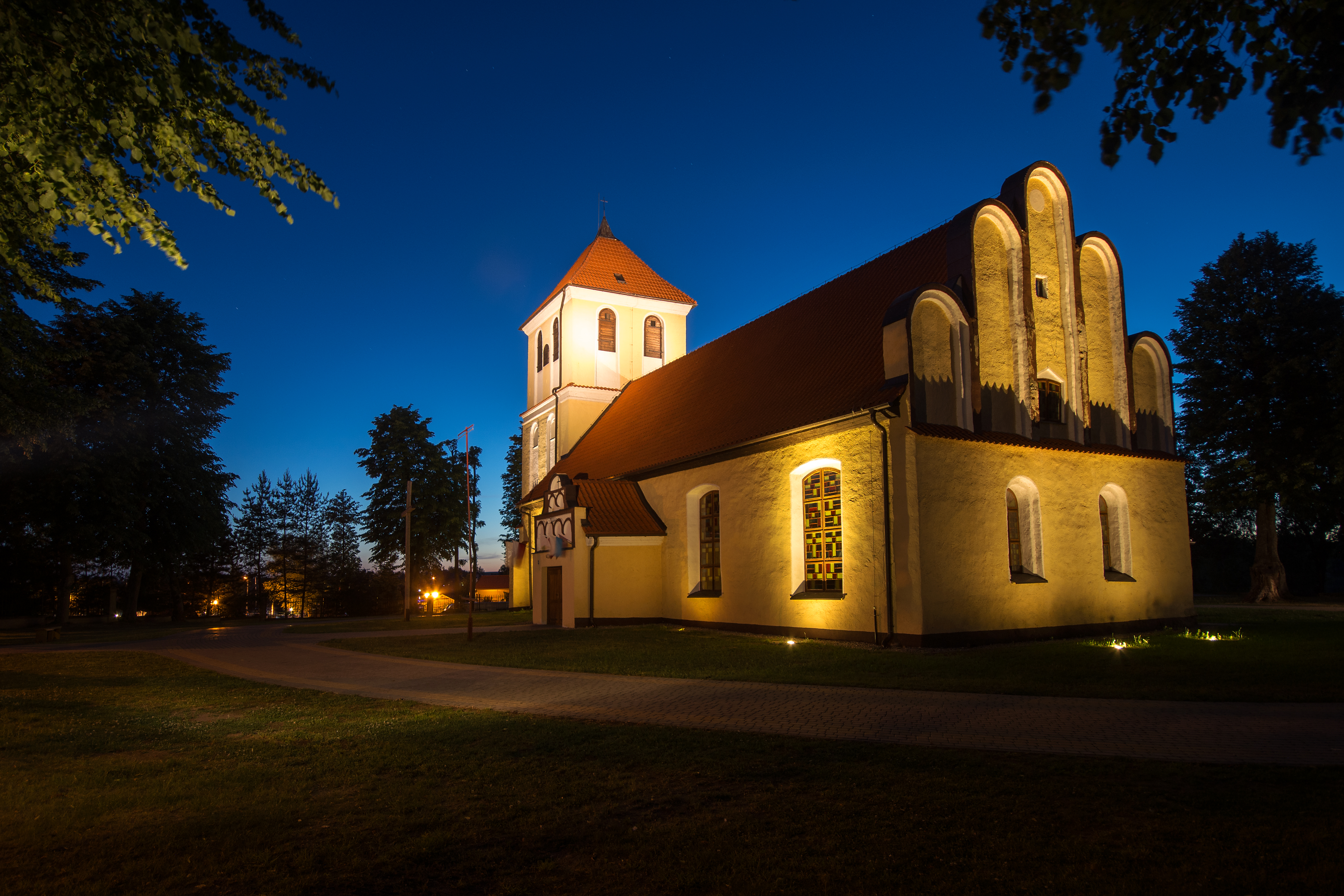 Rydzewo, kościół ewangelicki, ob. rzym.-kat. par. pw. św. Andrzeja Boboli, wraz z cmentarzem przykościelnym, 1591, XVIII